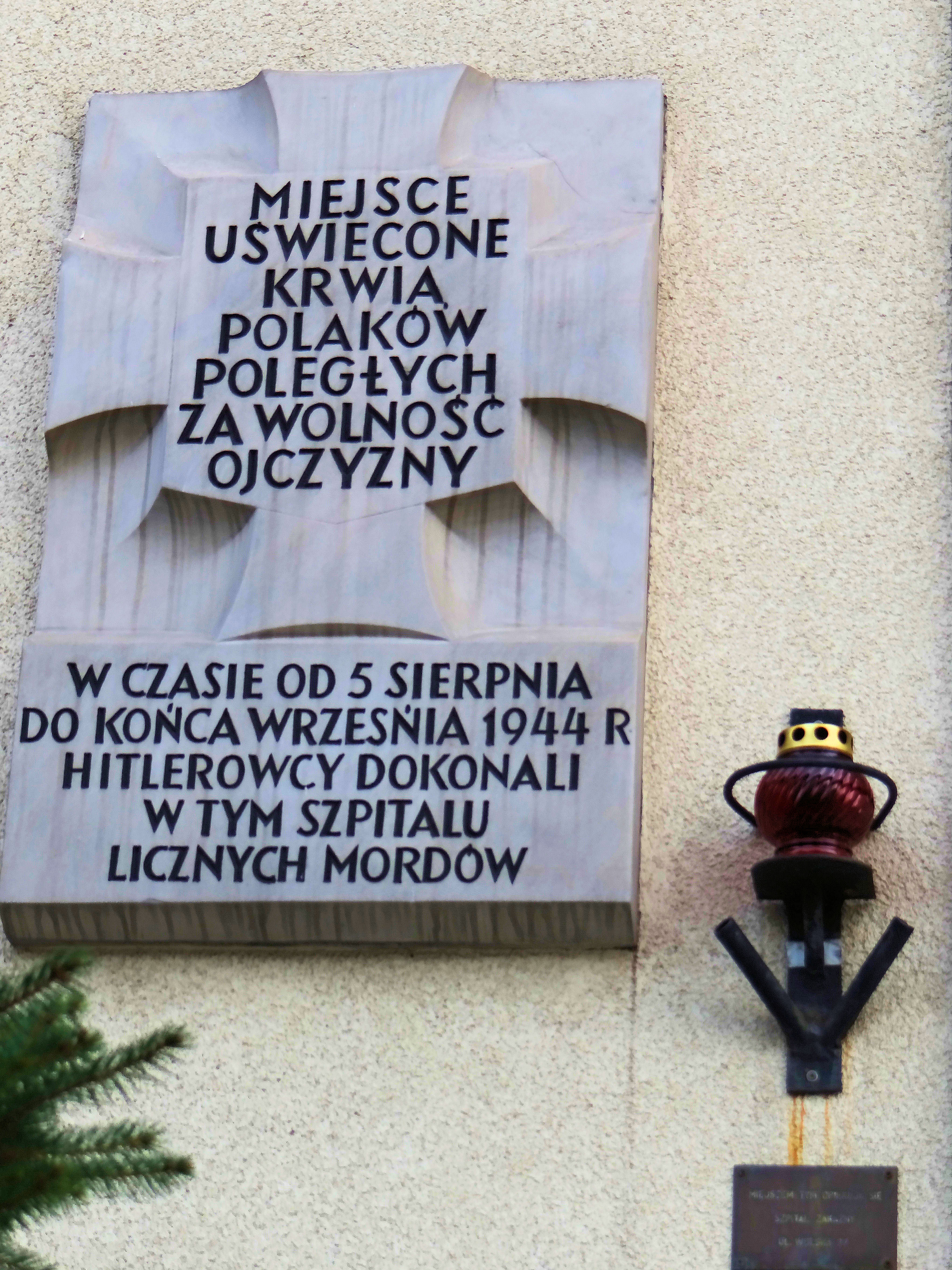 Szpital Zakaźny na Woli - miejsce pamięci - tablica Tchorka na elewacji budynku przychodni pzyszpitalnej